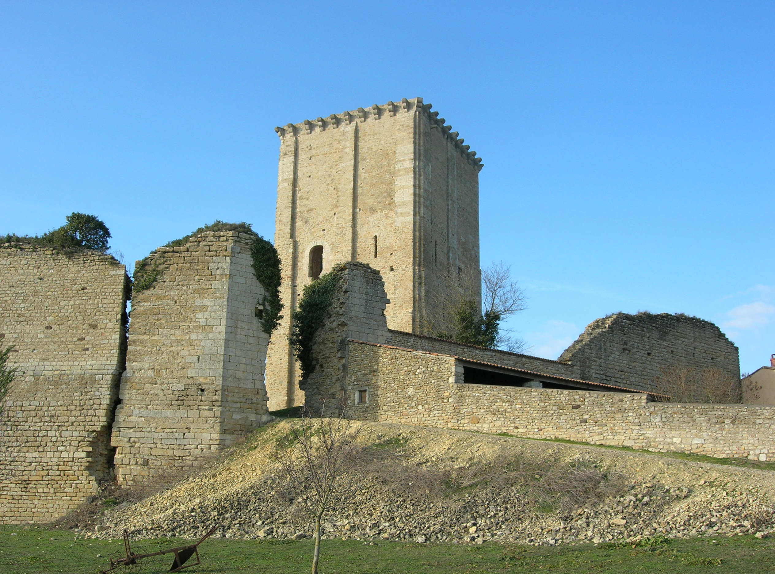 Description =Le donjon de Moncontour Source =Photo taken by Remi Jouan Date =Février 2006 Author =Remi Jouan